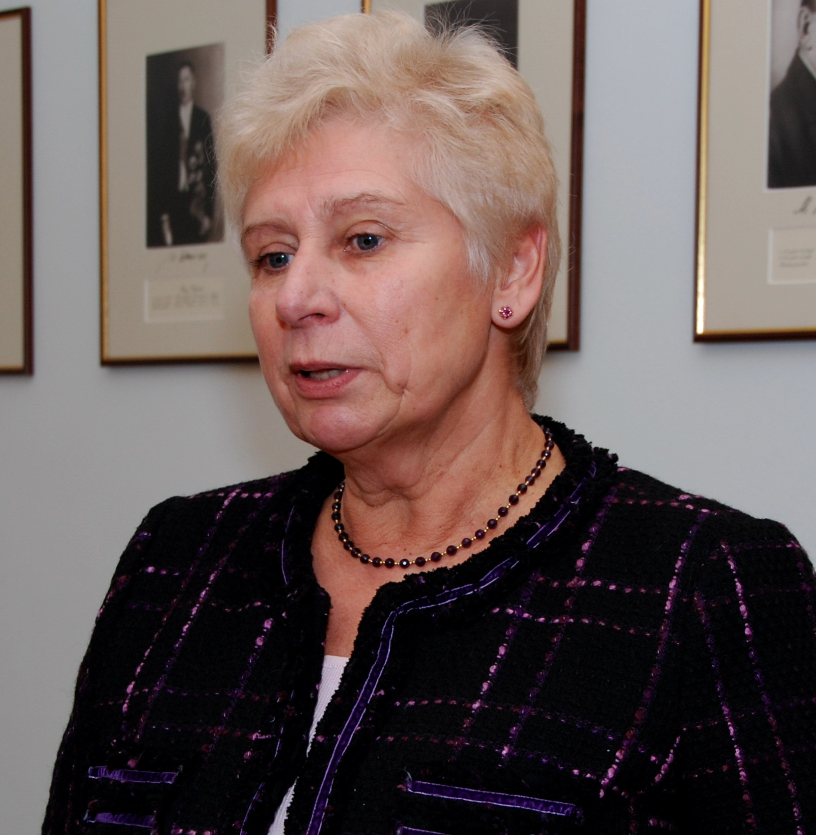 Valsts kancelejas direktore, Ministru kabineta Apbalvošanas padomes locekle Gunta Veismane Foto: Aivis Freidenfelds, Valsts kanceleja